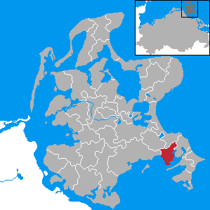 Lancken-Granitz, Landkreis Rügen, Mecklenburg-Vorpommern